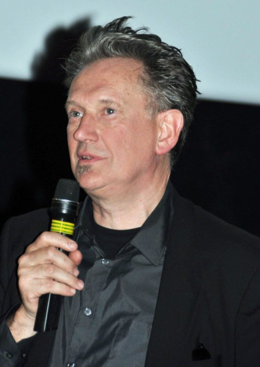 Benoît Delépine à l'avant-première du film Mammuth